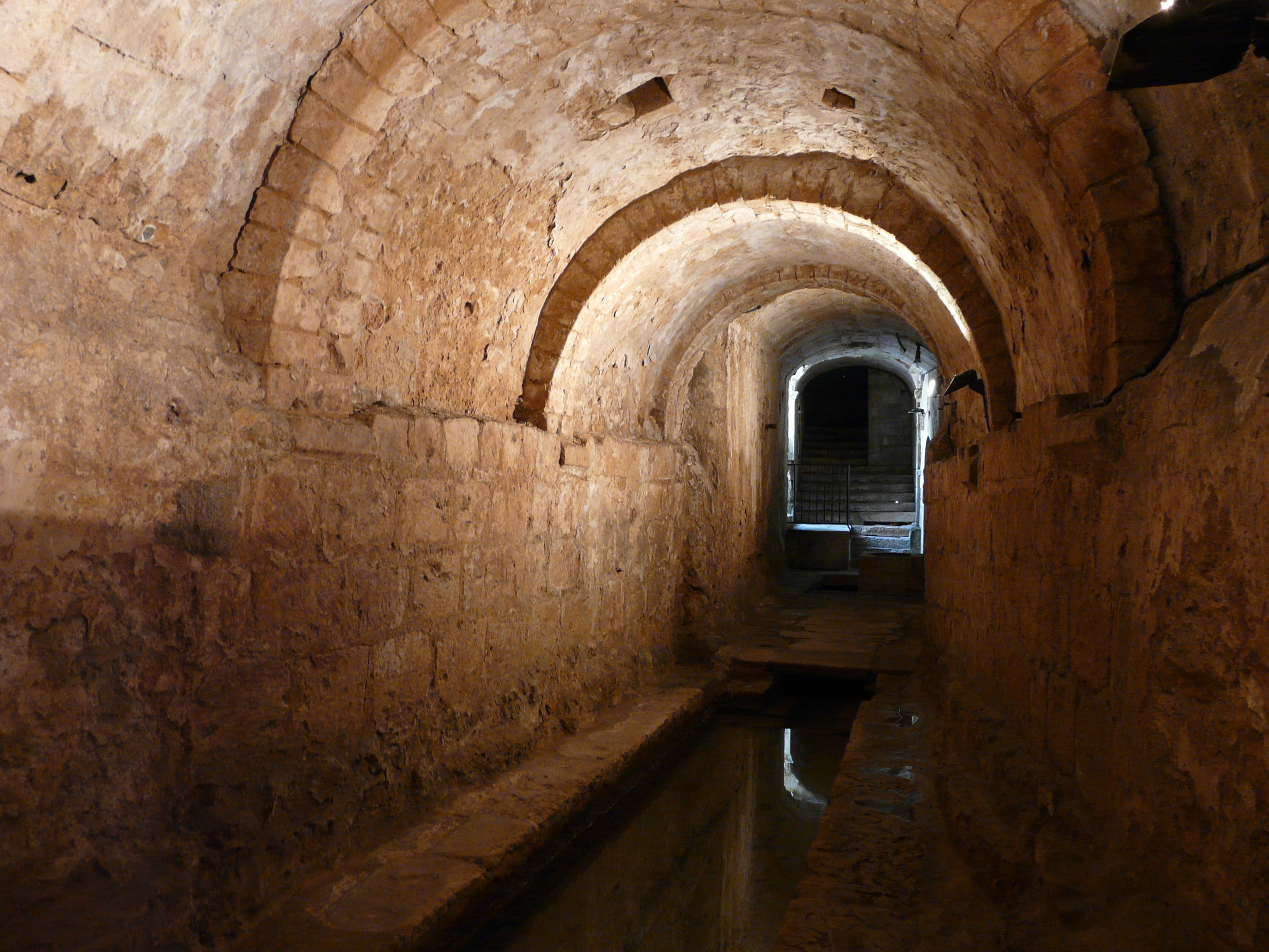 Fontaine souterraine d'Airvault, Deux-Sèvres, France